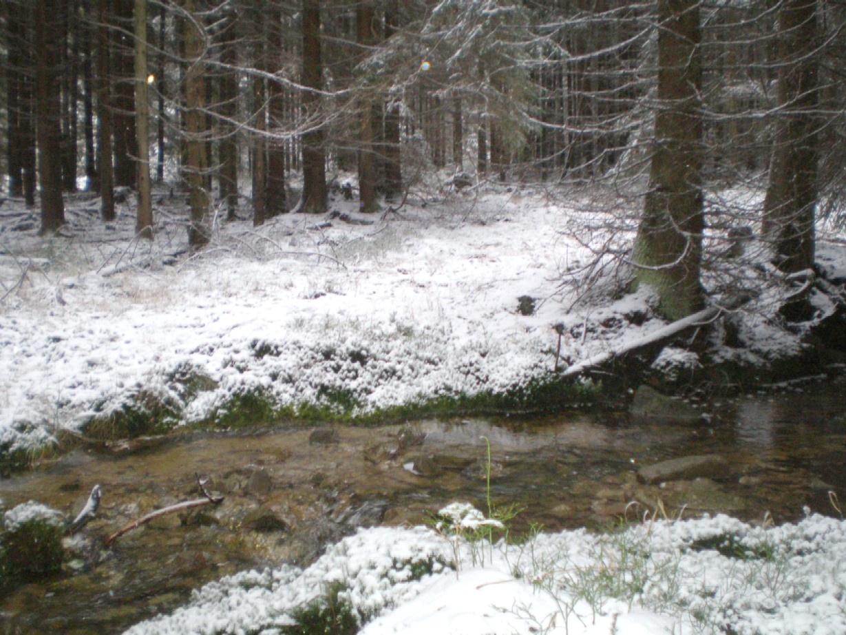 Třítrubecký potok v horní části stejnojmenného údolí